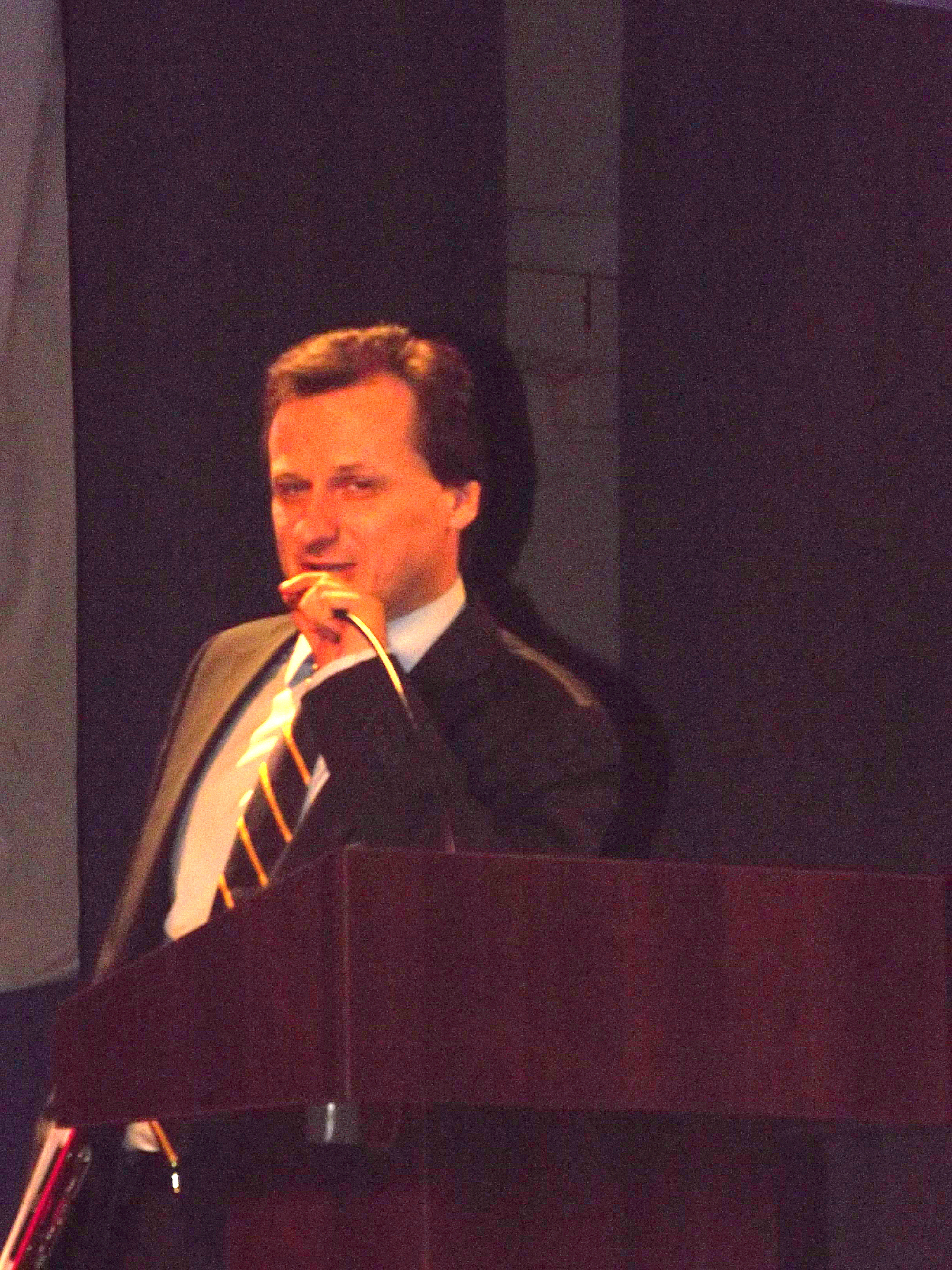 Tomasz Sommer podczas II Kongresu Nowej Prawicy Sala Kongresowa, Warszawa 23 marca 2014 r.